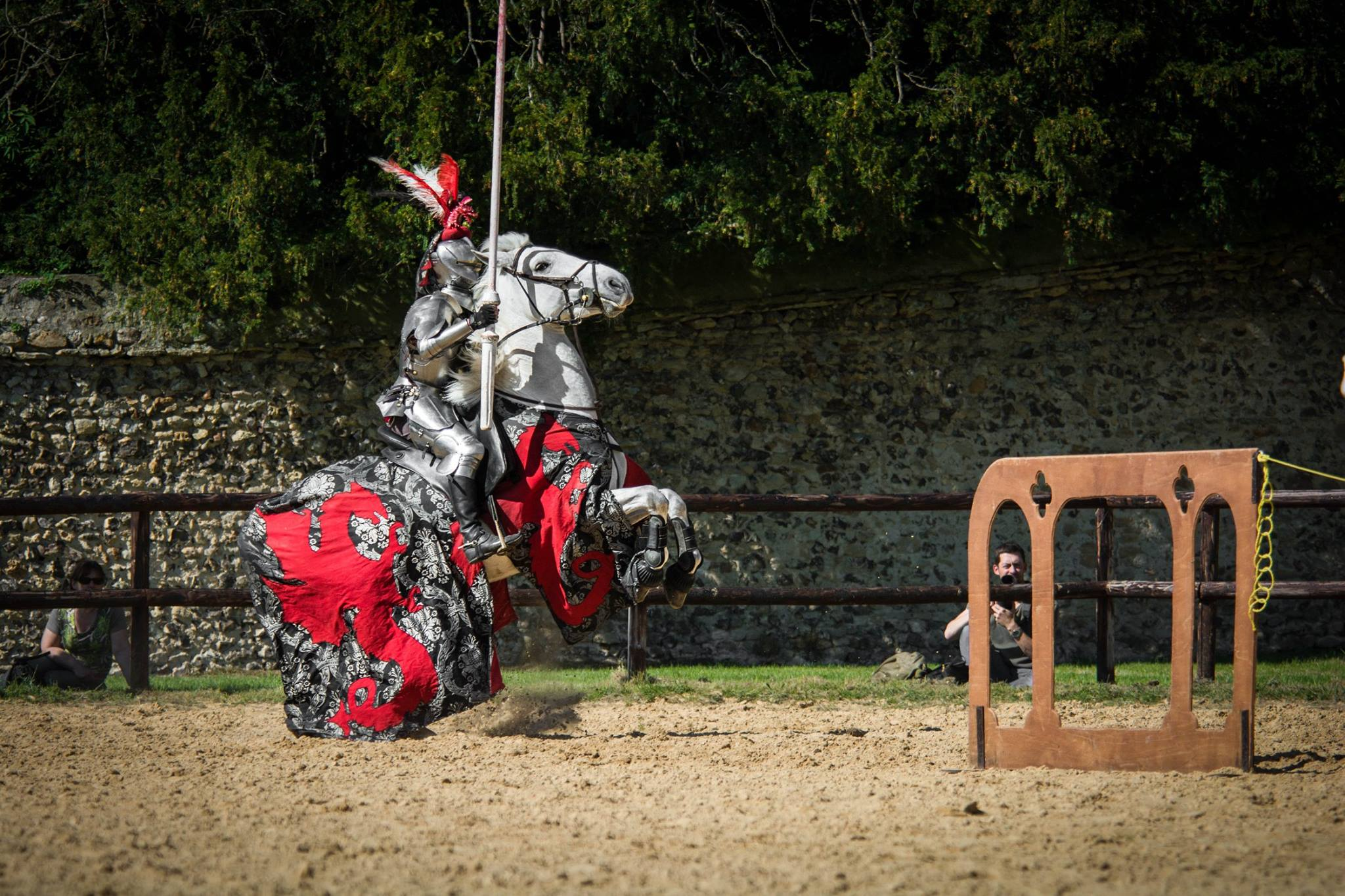 joute équestre et sportive